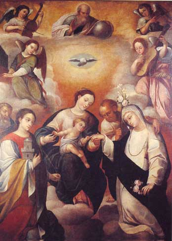 Desposorios de Santa Catalina. Siglo XVIII. Óleo sobre tela 176 x 130 cm.